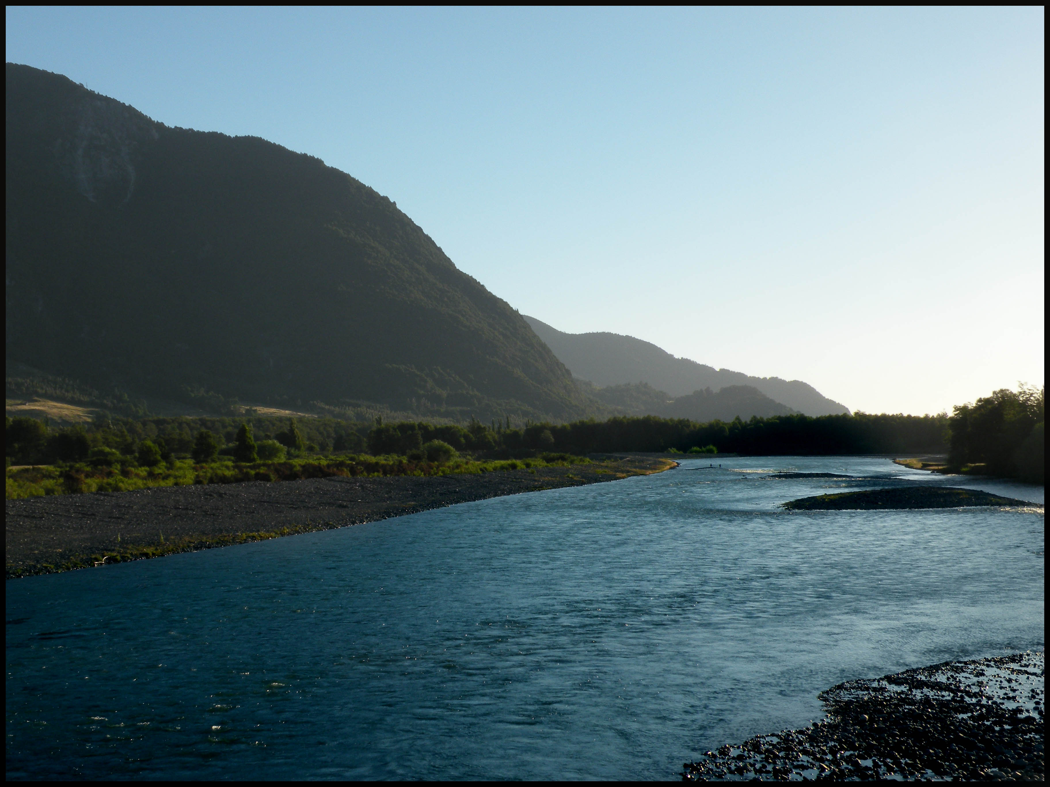 Río Allipén